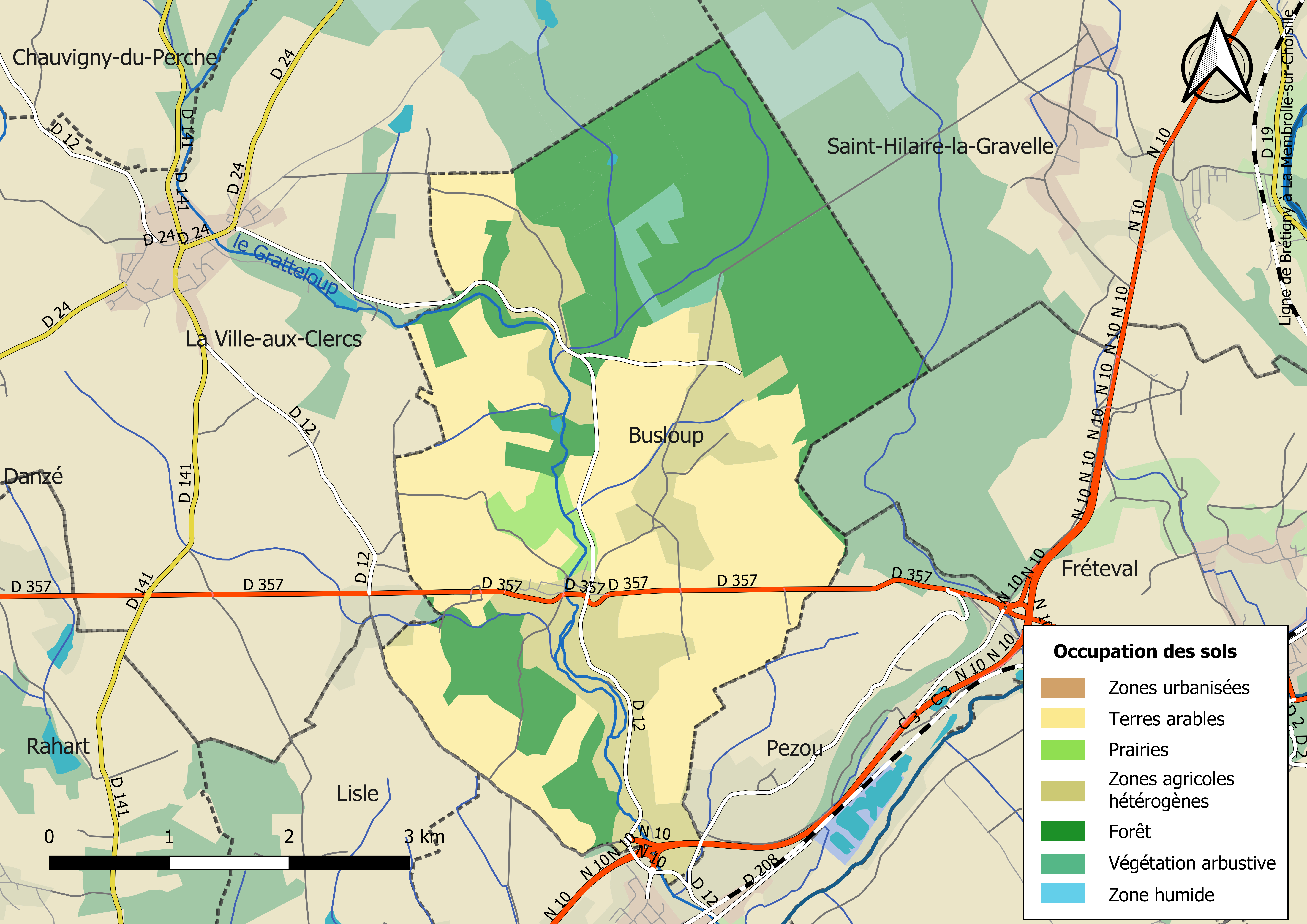 Carte des infrastructures et de l’occupation des sols en 2018 de la commune de Busloup (France).